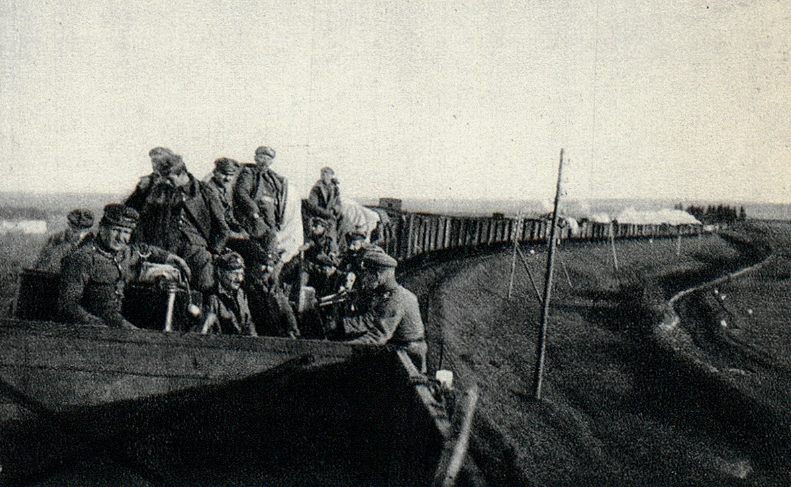 Transporty Polskiego Korpusu Posiłkowego jadące na Bukowinę.